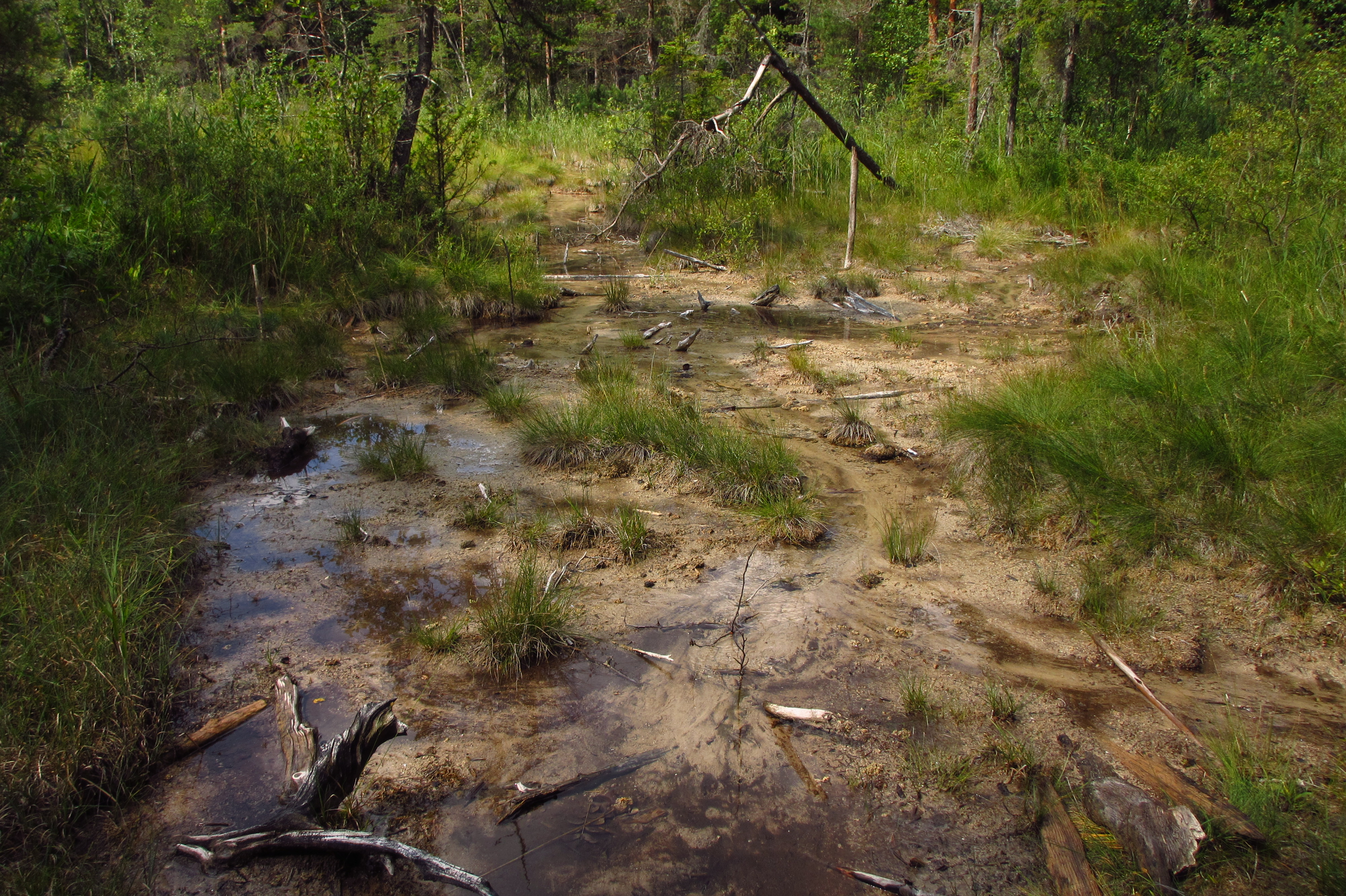 Allikas Valgejärve MKA-l